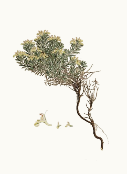 Teucrium montanum L., 1753